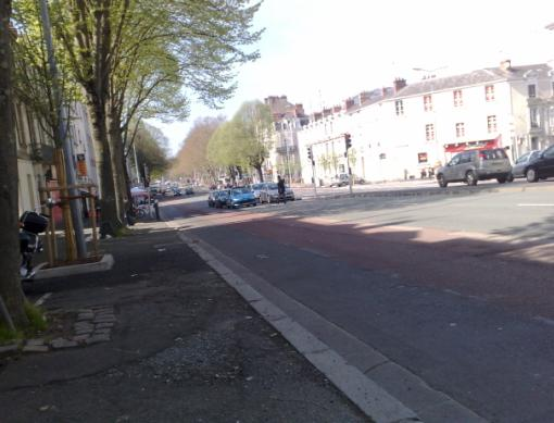 Carrefour entre le Boulevard Carnot et l'Avenue Marie-Talet.